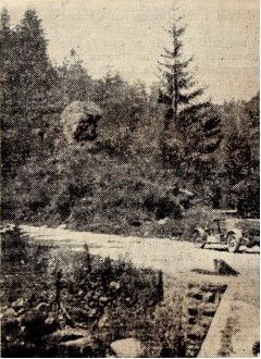 Drumul spre Beliş